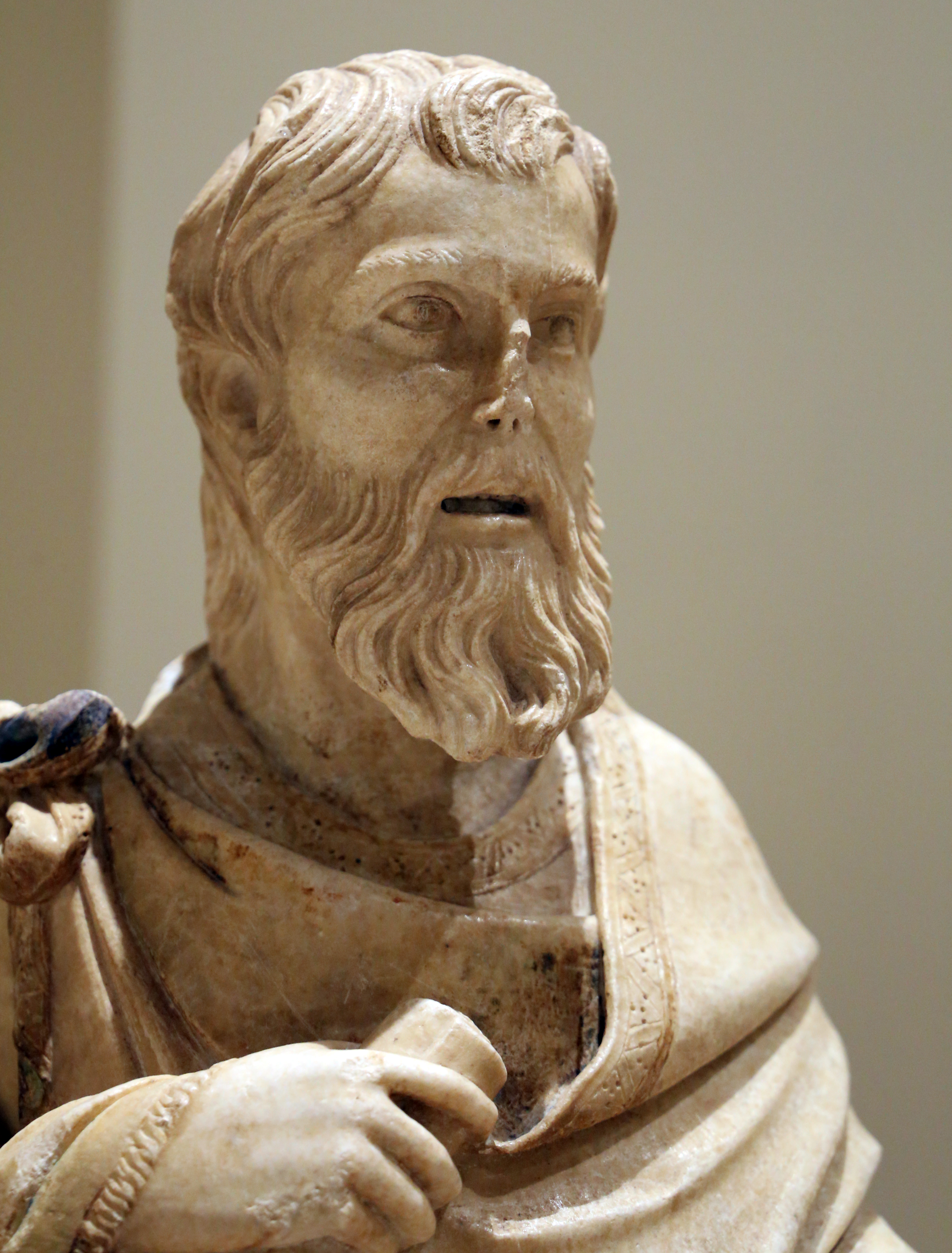 Museo di Arte Sacra (Massa Marittima) This is a photo of a monument which is part of cultural heritage of Italy.